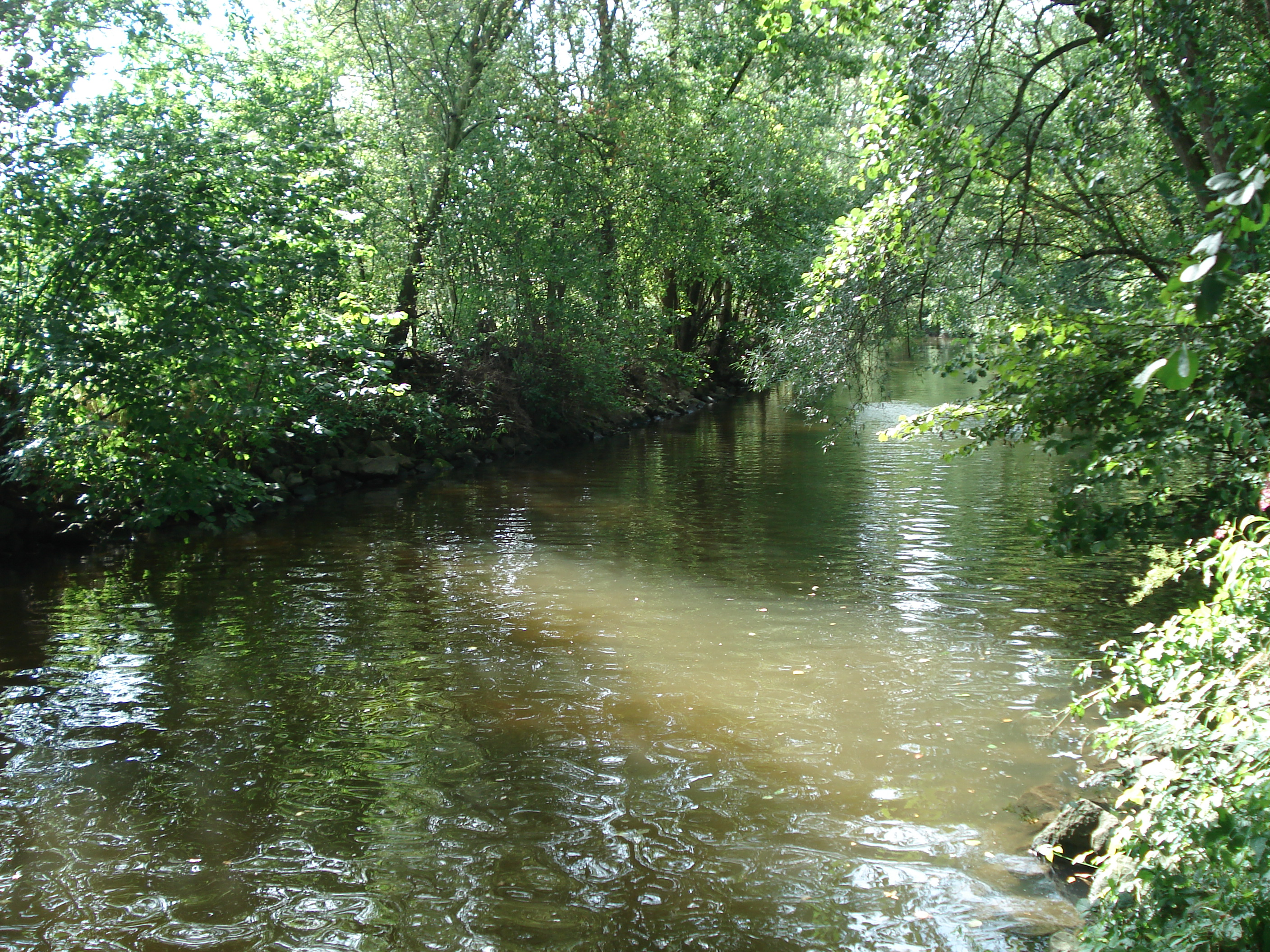 Die Mömling in Obernburg